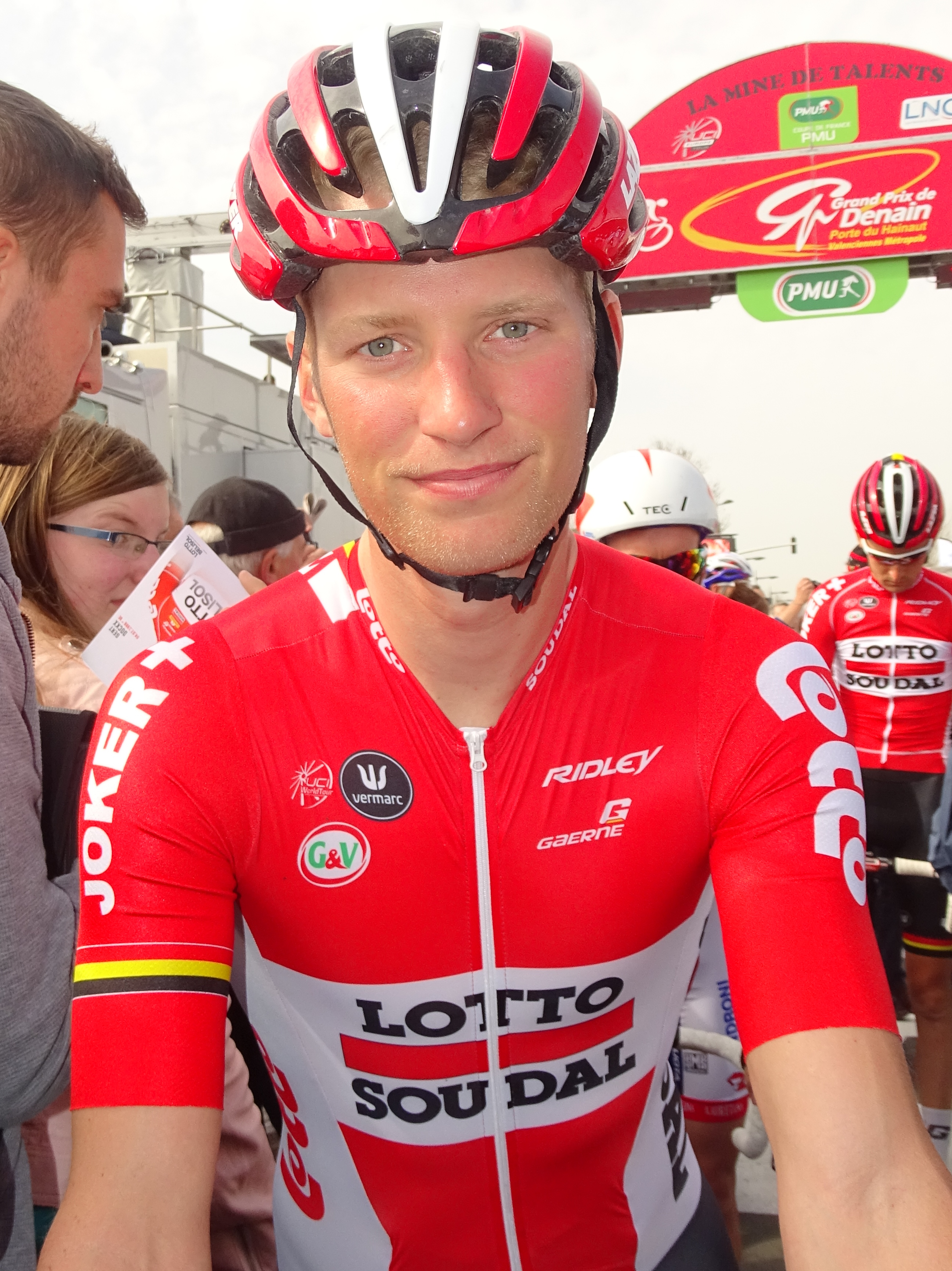 Reportage réalisé le jeudi 16 avril à l'occasion du départ et de l'arrivée du Grand Prix de Denain 2015 à Denain, Nord, Nord-Pas-de-Calais, France.